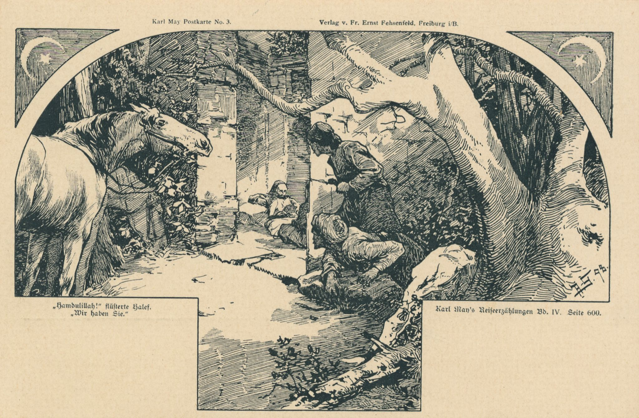 Karl May Postkarte No. 3. „Hamdulillah!“ flüsterte Halef. „Wir haben sie.“, Karl May’s Reiseerzählungen Bd. IV (In den Schluchten des Balkan). Seite 600.